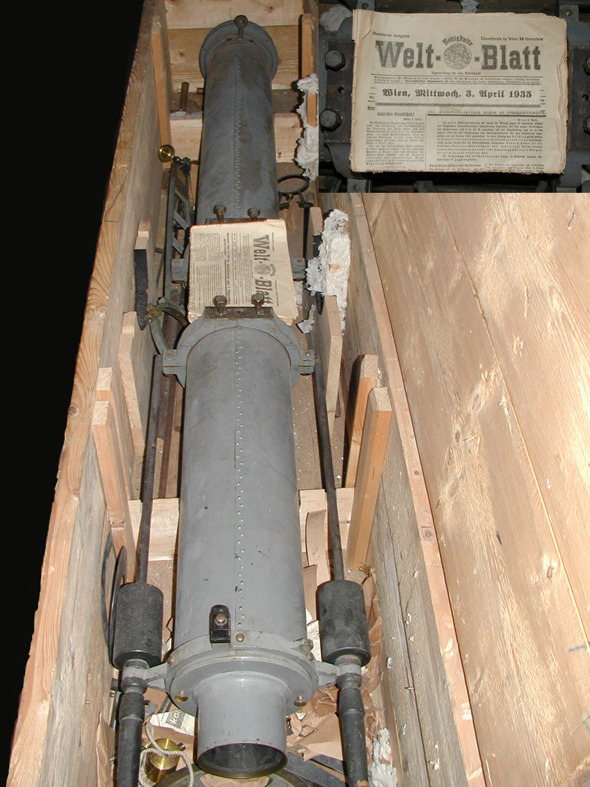 Teleskop in der Eremitage Blaca (Insel Brač, Kroatien). Dieses große Teleskop wurde für den letzten Pater (Nikola Miličević) zu Fuß mit Hilfe von Lasteseln den langen schmalen Weg von der Bucht zum Kloster hinauf geschafft, damit er von dort aus die Sterne beobachten und seinen astronomischen Forschung nachgehen konnte.